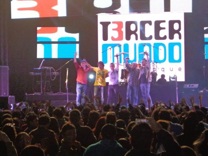 Un concierto de Tercer Mundo en Ecuador.